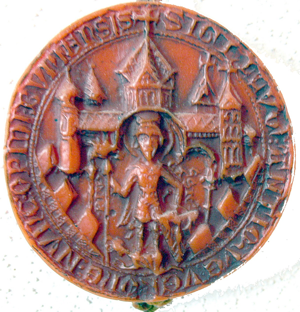 Stadsiegel von Bonn 1280.